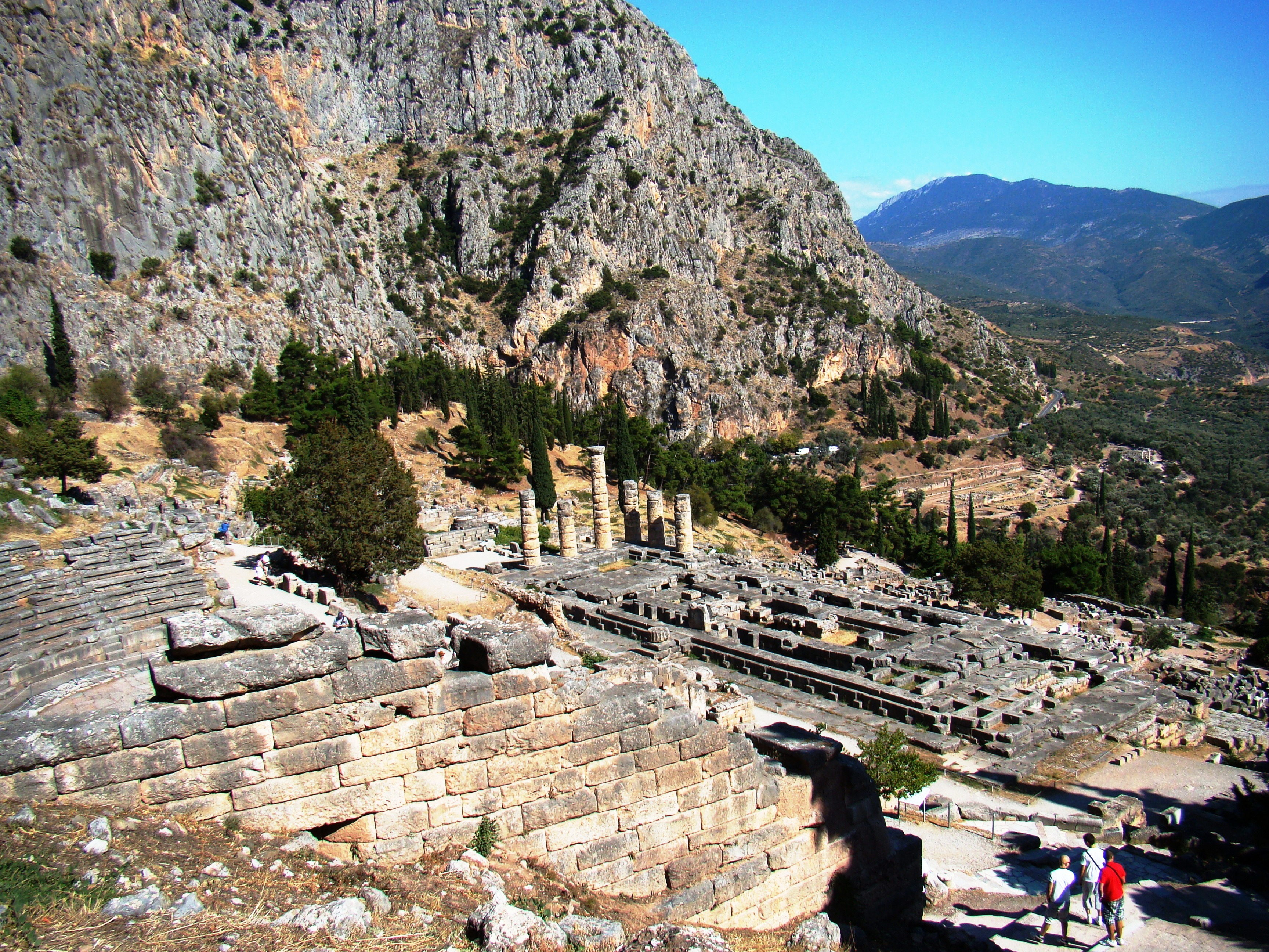 Wakacje 2011